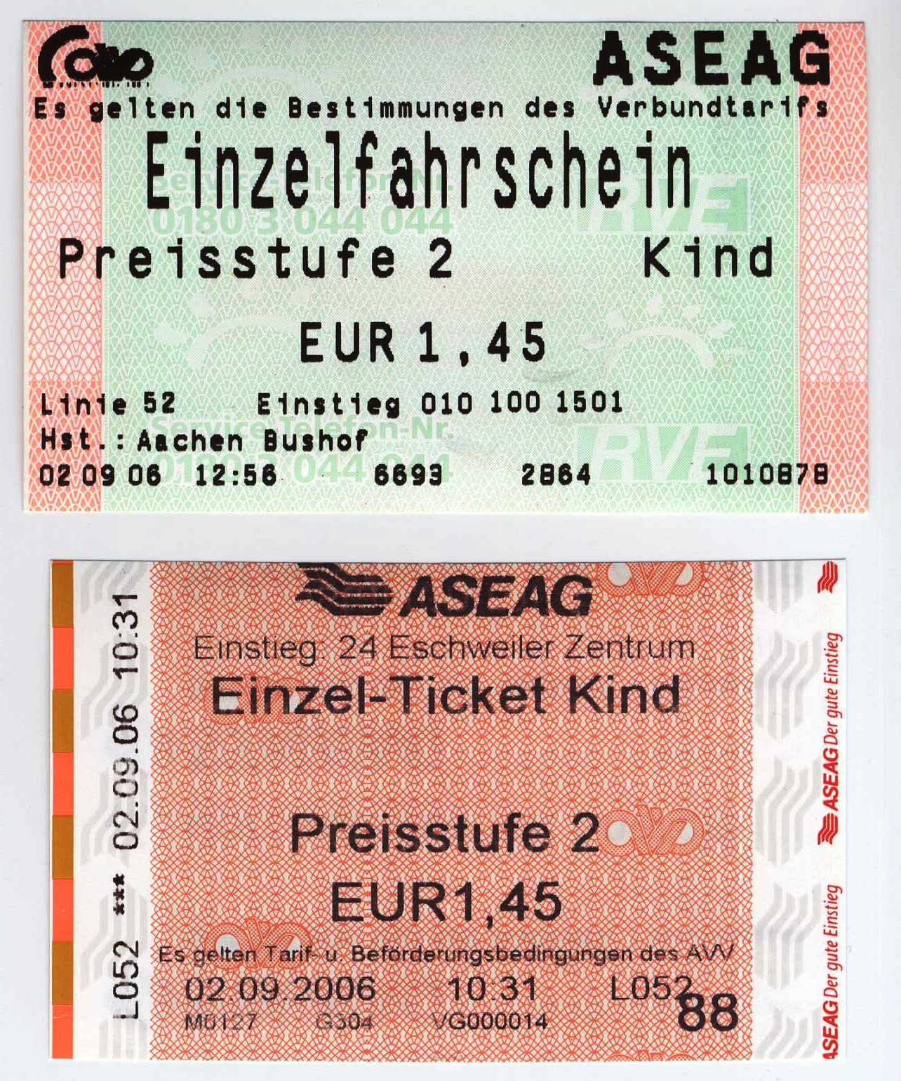 Fahrscheine des Aachener Verkehrsverbundes